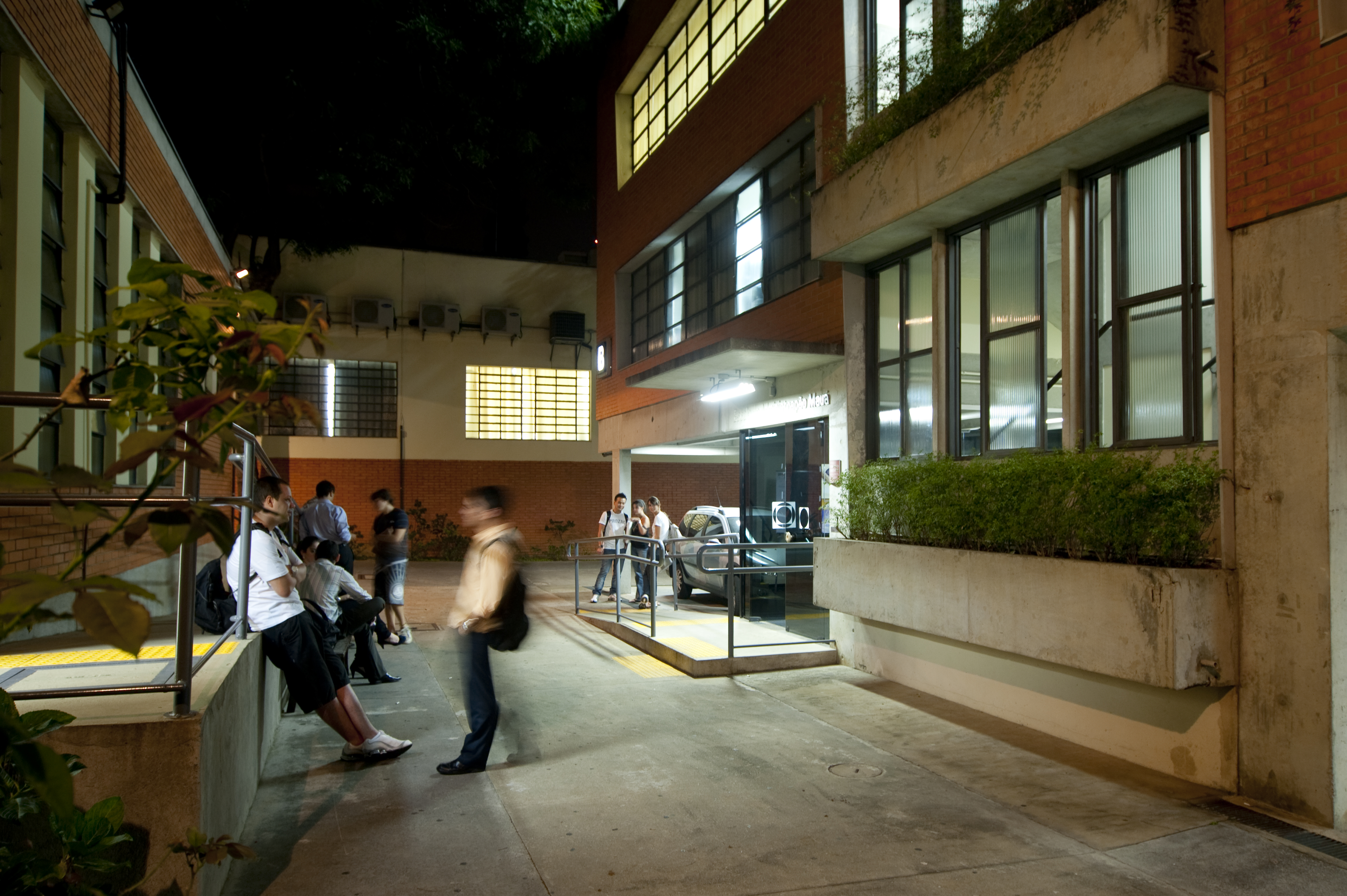 Instituto Mauá de Tecnologia - Campus de São Paulo